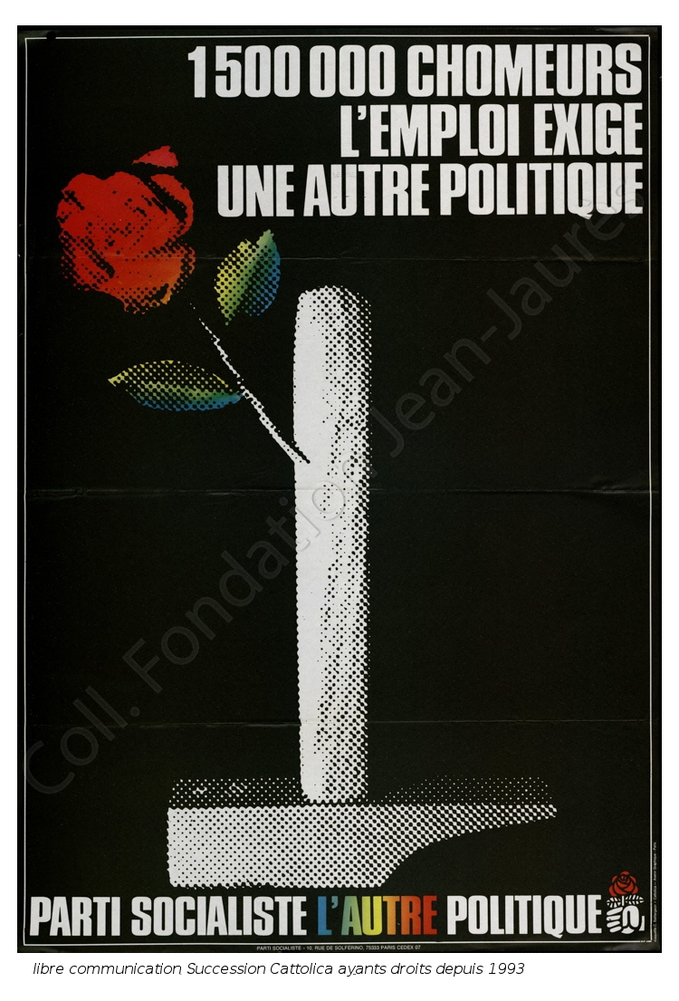 Présidentielles 1980, Claude Baillargeon et Hector Cattolica